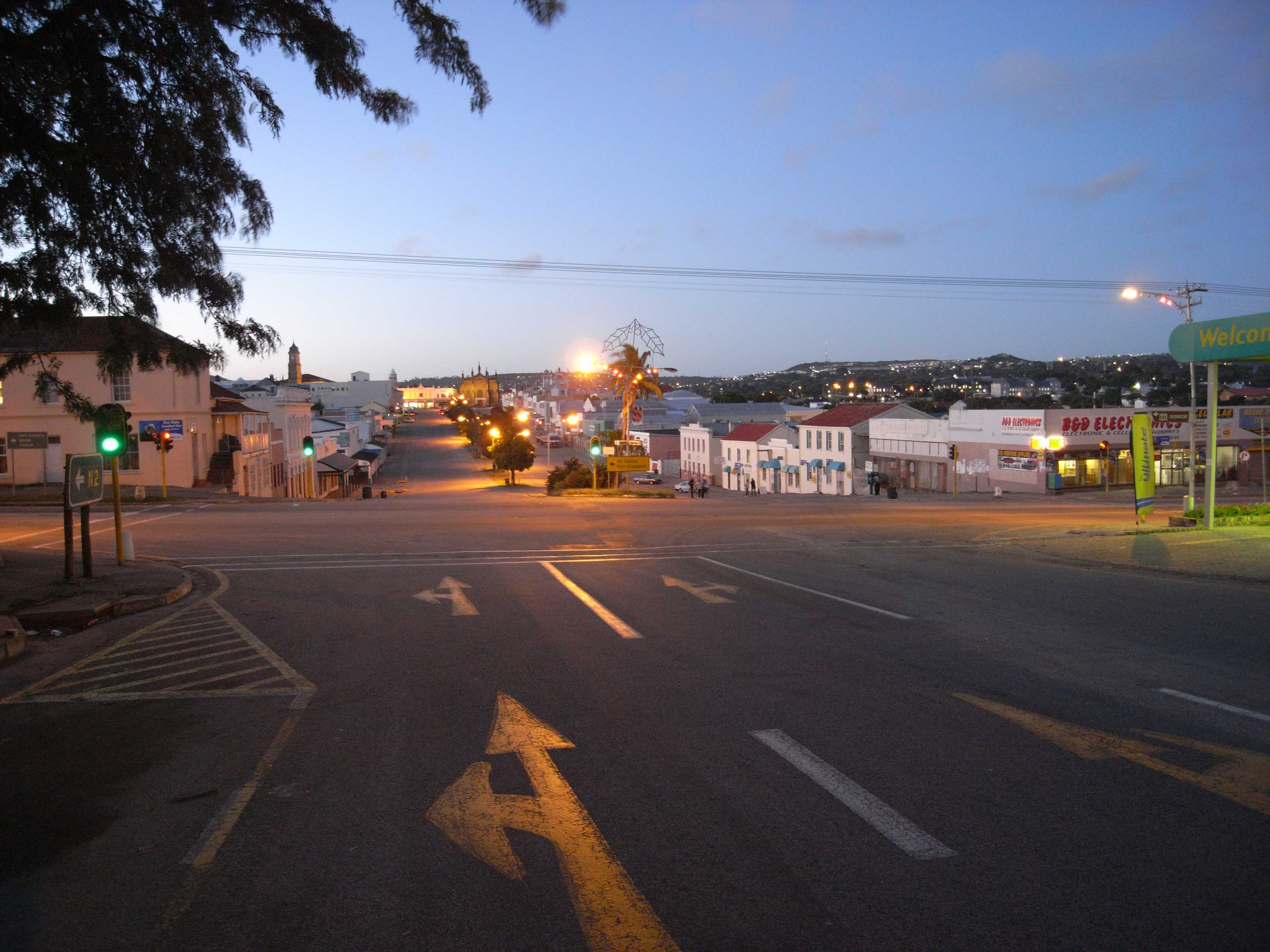 Grahamstown in the evening